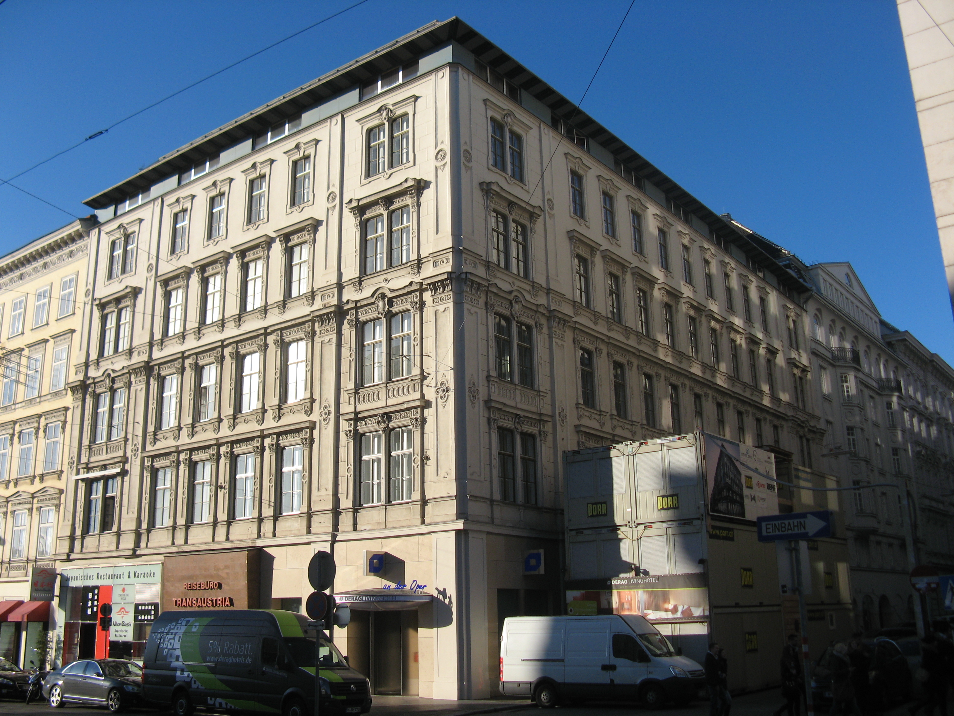 Eckhaus, Elisabethstraße 1 (1860), von Wilhelm Westmann, Wien-Innere Stadt